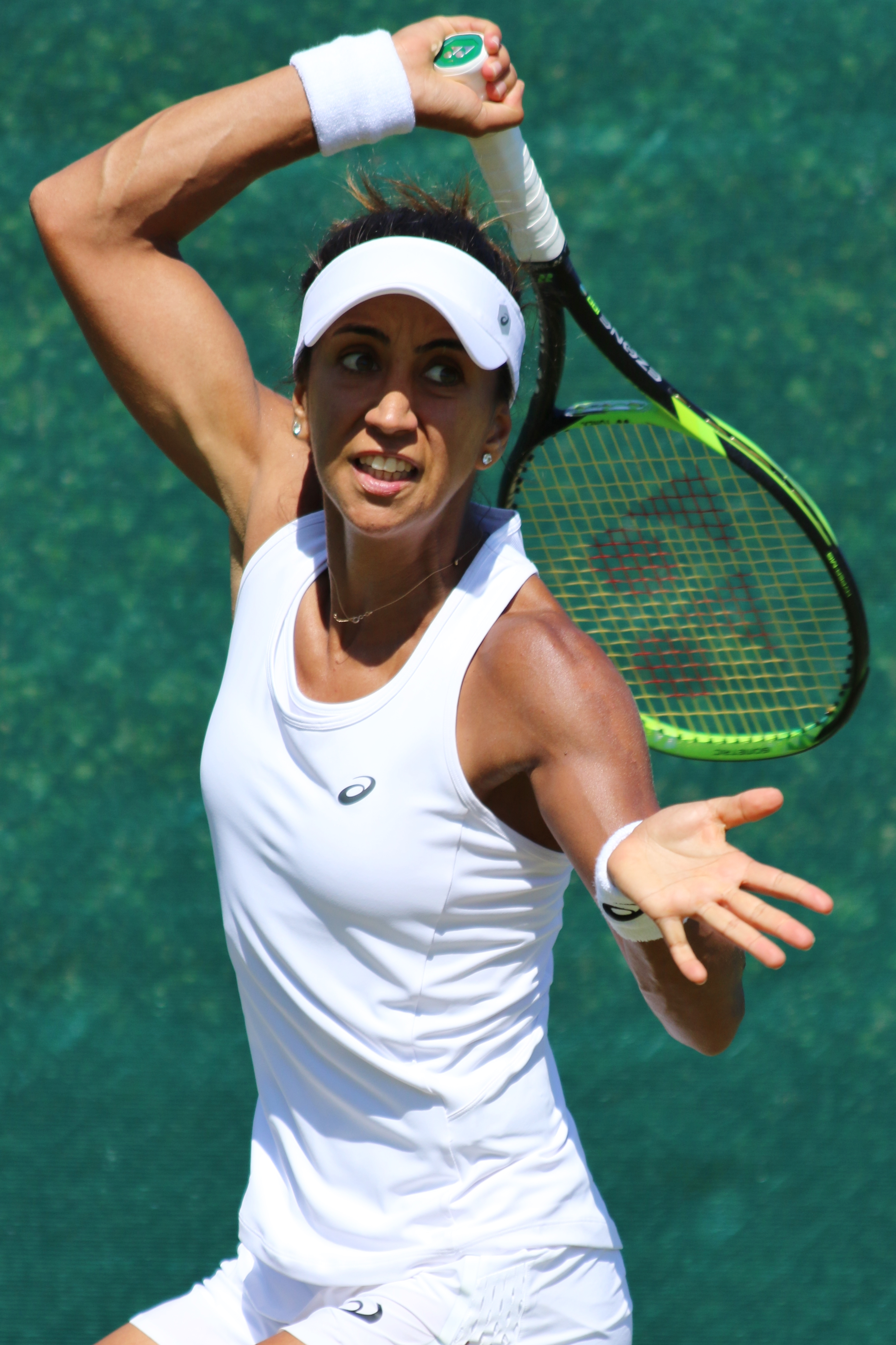 Buyukakcay WMQ18 (10)